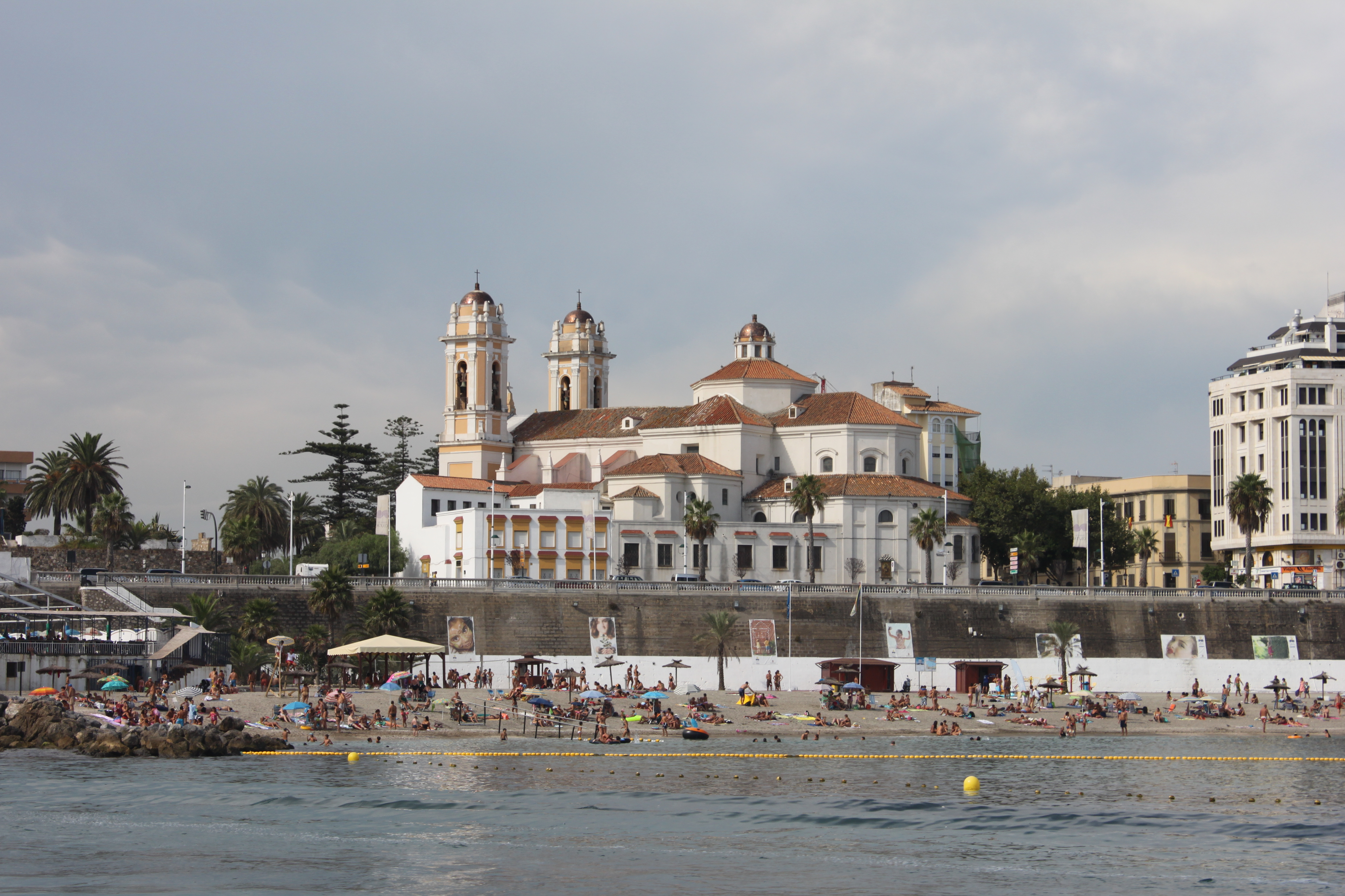 Vista de la catedral de Ceuta desde el mar